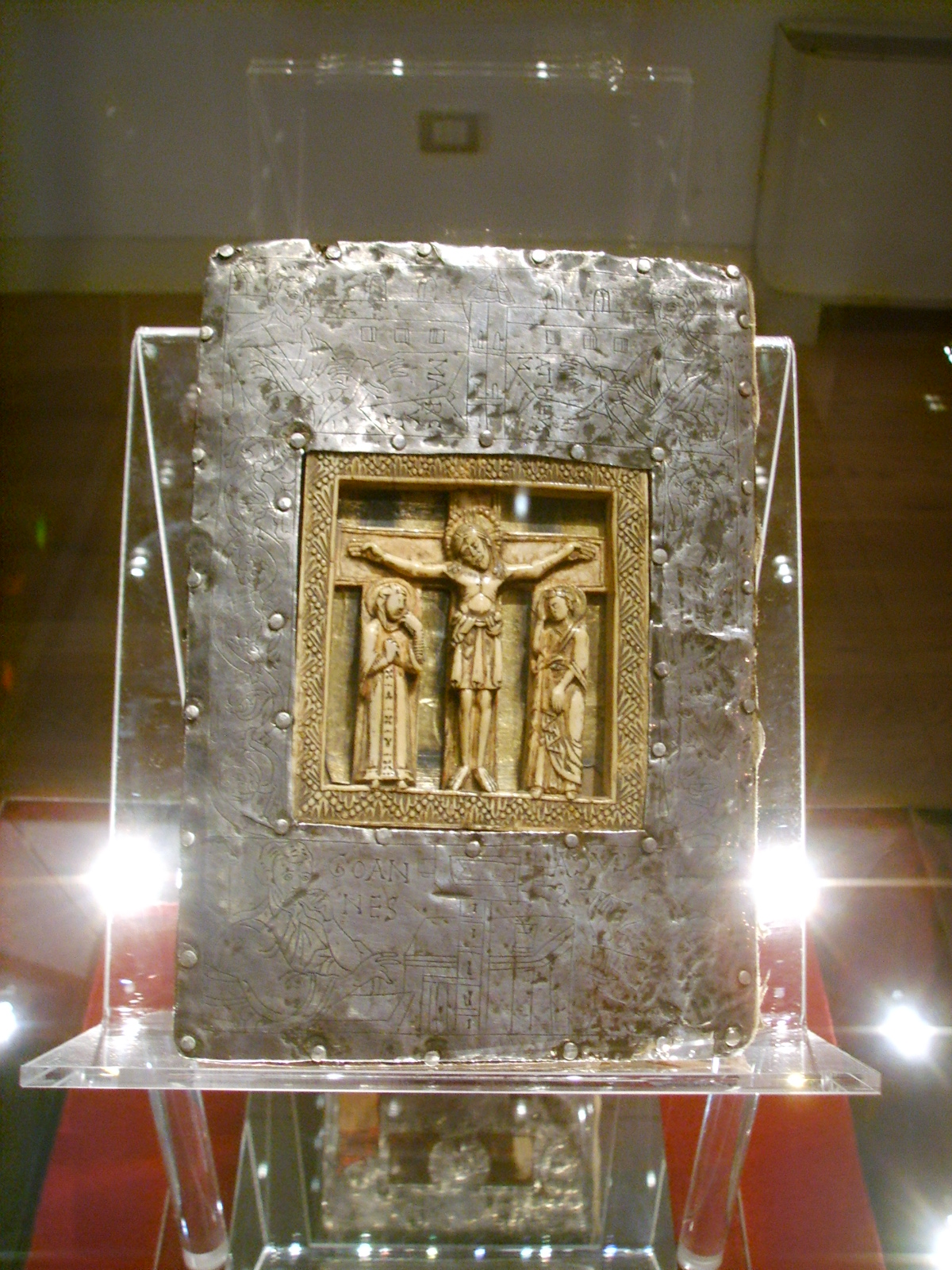 Evangelistario da nonantola (1106 circa)